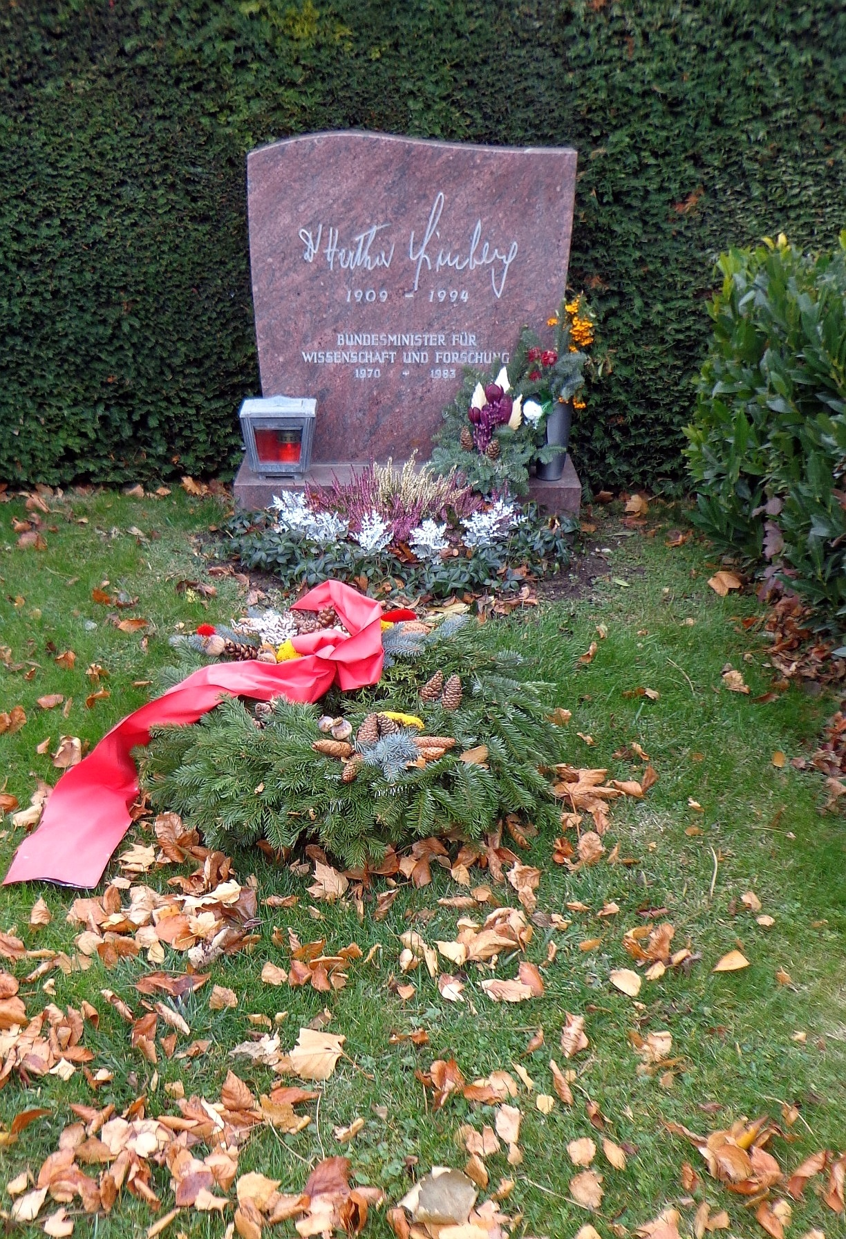 Wiener Zentralfriedhof - Gruppe 32 C, Ehrengrab von Hertha Firnberg